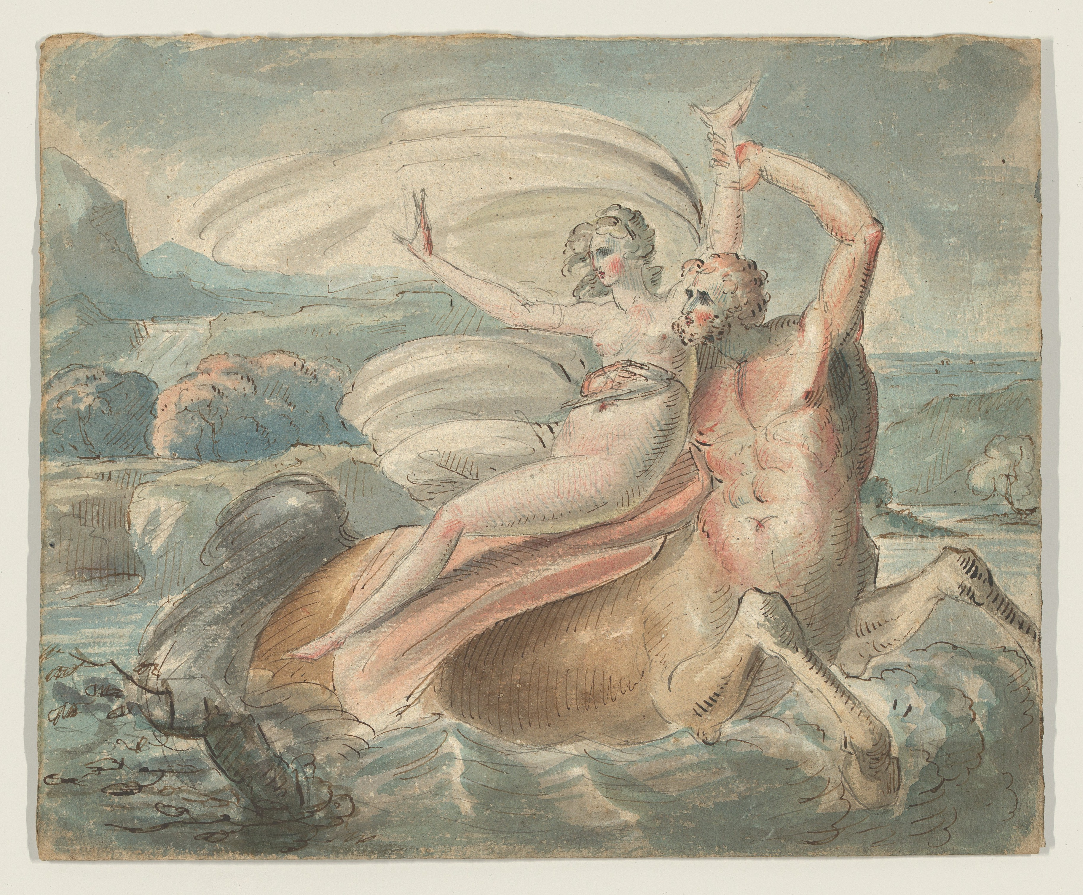 Drawing; Drawings